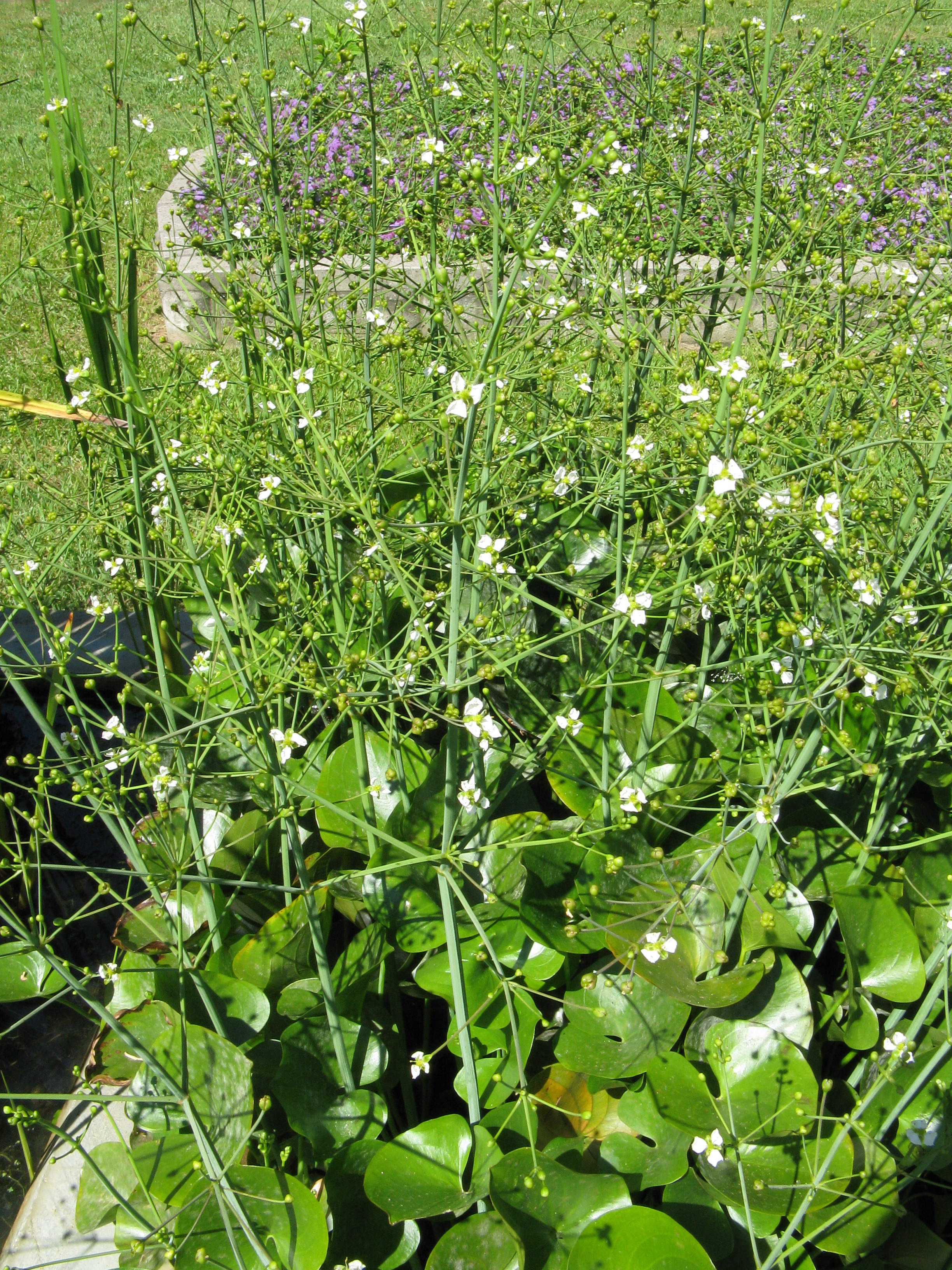 Scientific name Caldesia parnassiifolia